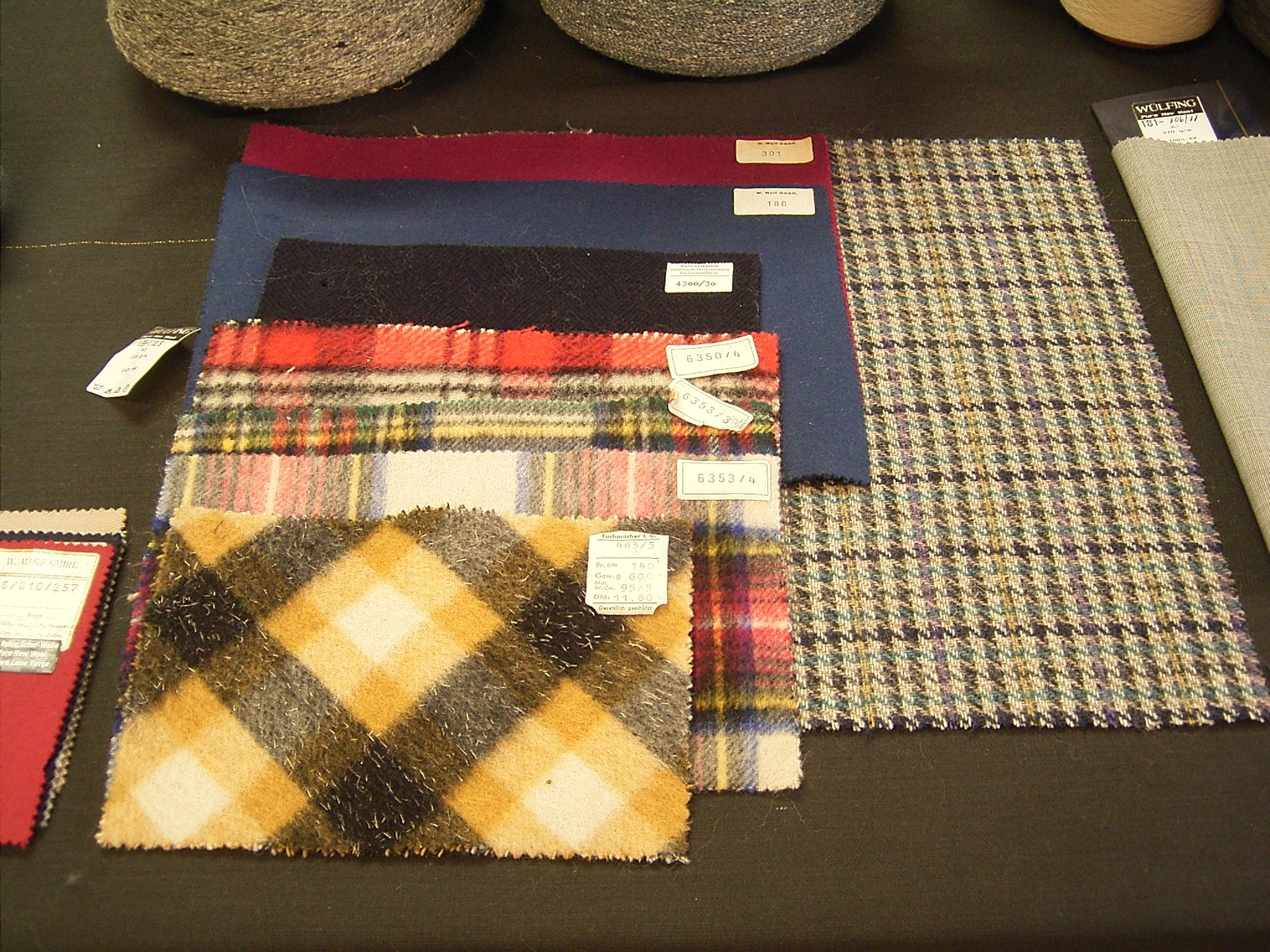 Wülfing-Museum in Radevormwald-Dahlerau